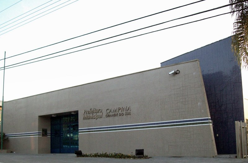 Prefeitura de Campina Grande do Sul (Grande Curitiba), PR, Sul do Brasil.